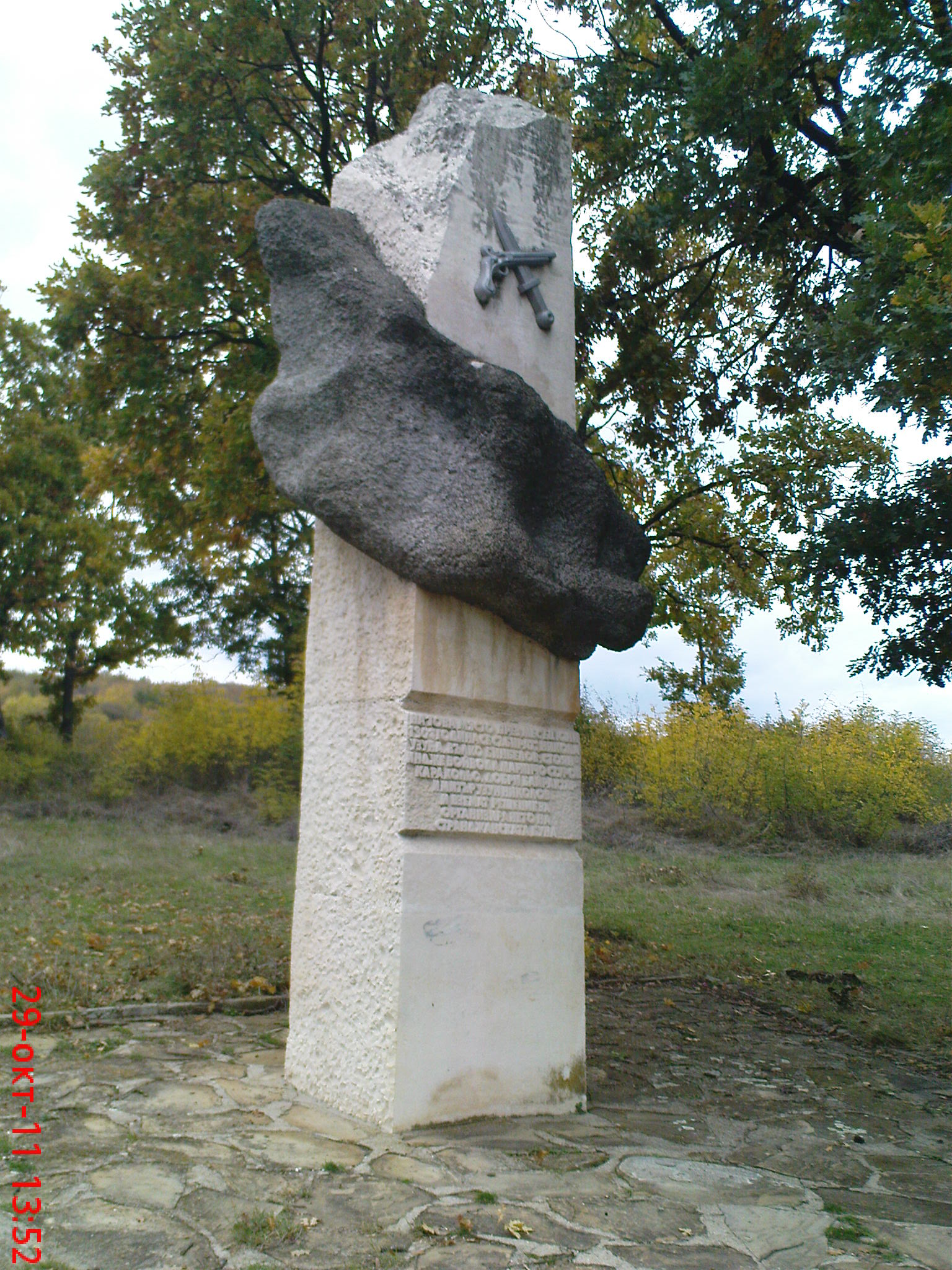 Паметник